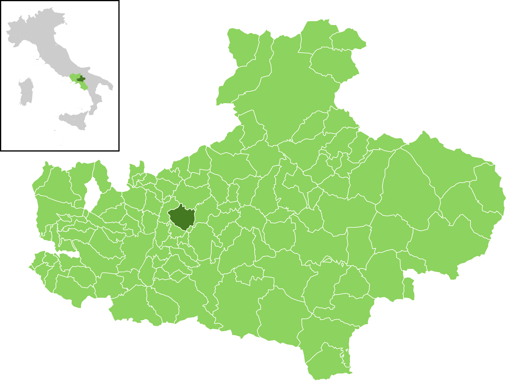 Posizione del comune all'interno della provincia di Avellino